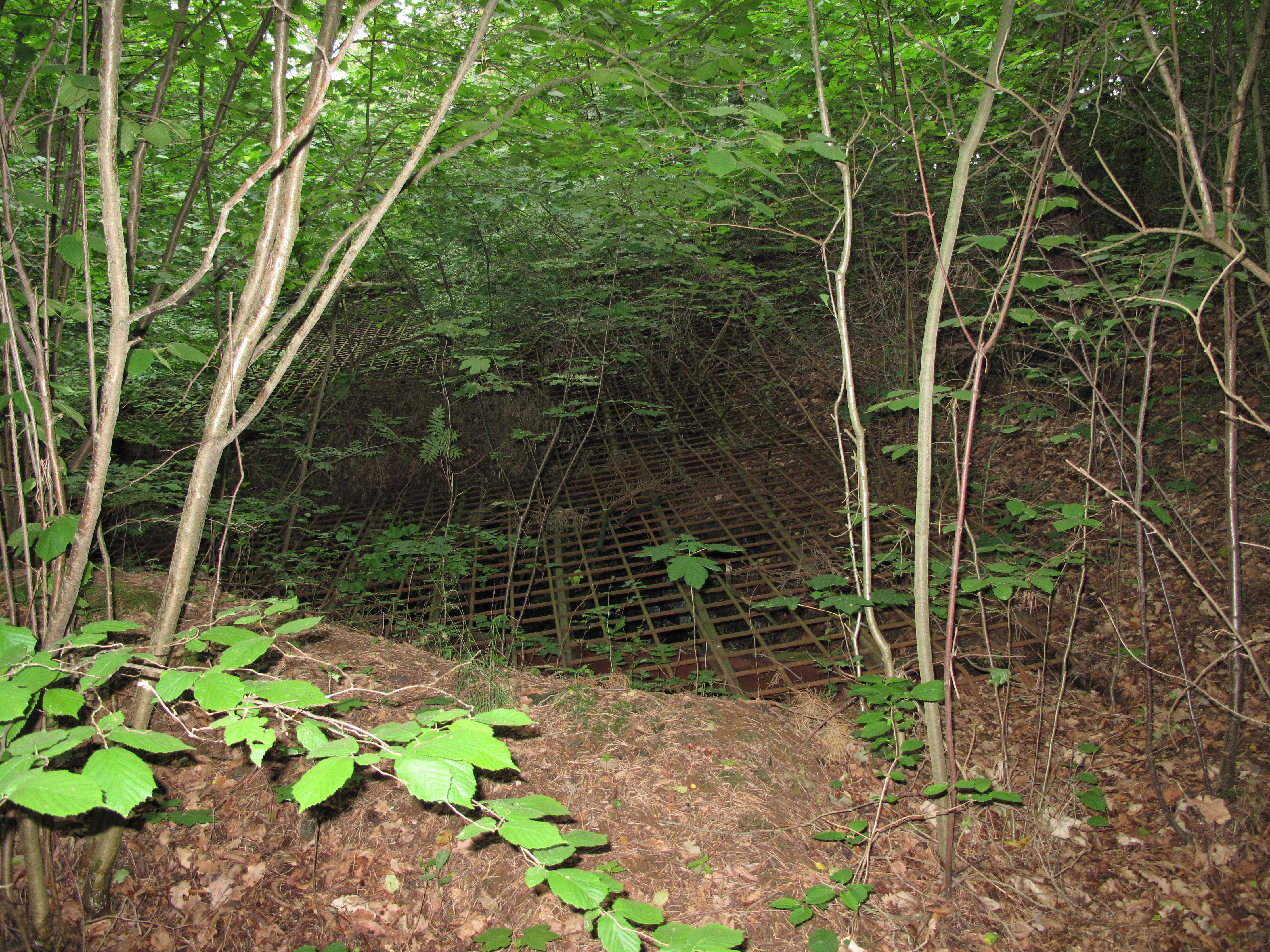 Lom v přírodní památce Na černé rudě. Okres Kutná Hora, Česká republika.